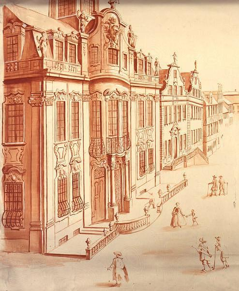 Rathaus von Schwäbisch Hall, Nachzeichnung eines Gemäldes von J. M. Roscher